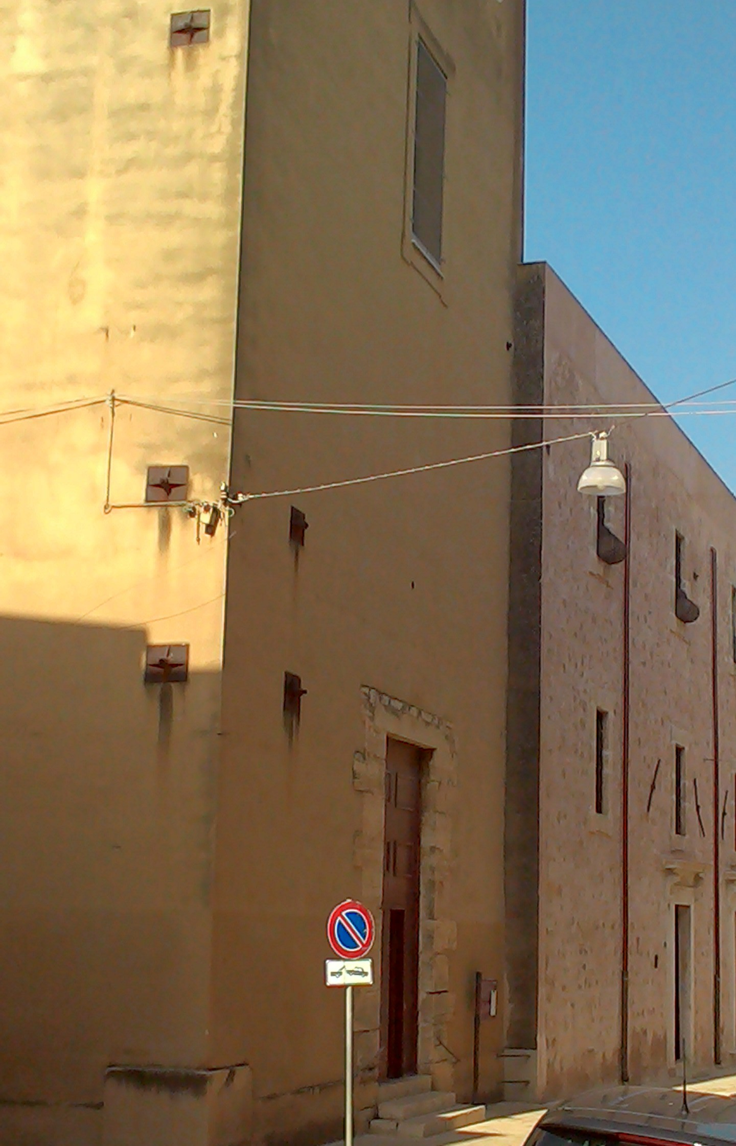 Facciata della chiesa